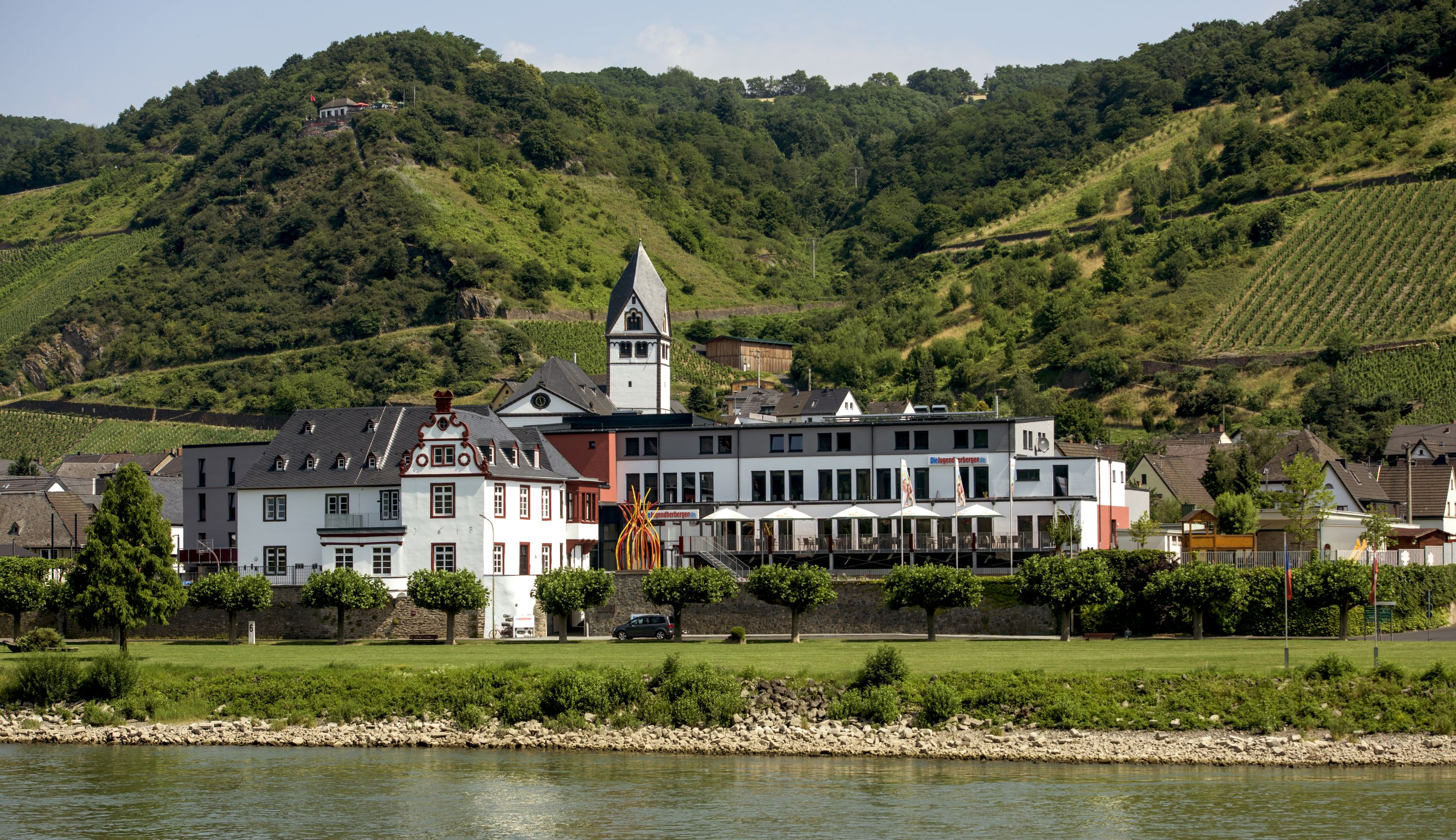 Die Jugendherberge Leutesdorf am Rhein ist ein ehemaliges Kloster und wurde in 2015 zur Jugendherberge umgebaut.